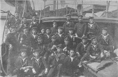 第三回旅順閉塞隊愛国丸乗員